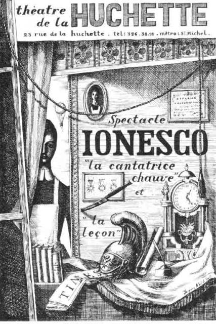 affiche de "La Cantantrice chauve" la leson, spectacle de Theatre de la Huchette